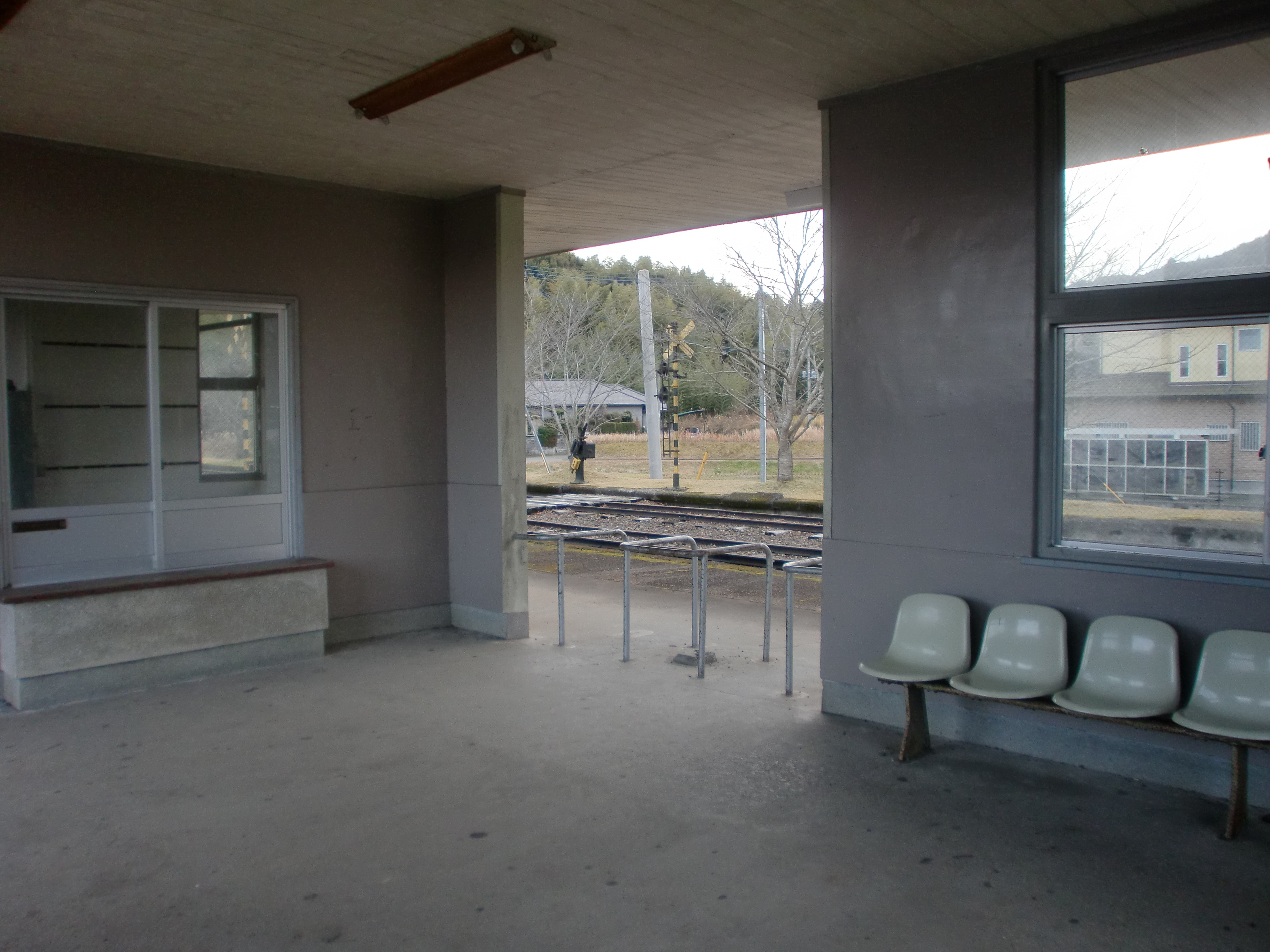 樋脇駅の待合所と改札口跡。